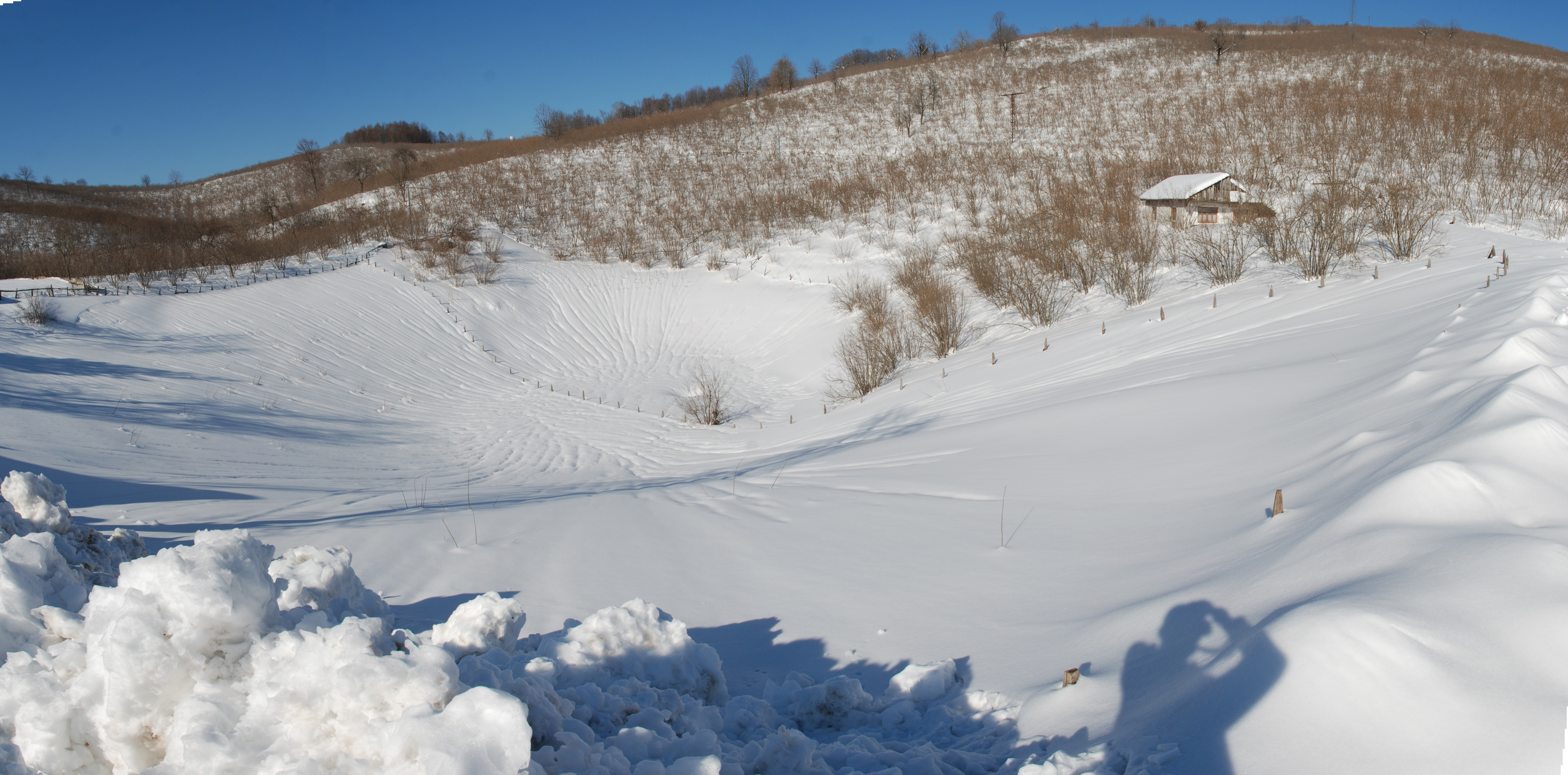 Sakarya, Kocaali, Karadere köyünde bulunan Uvala.